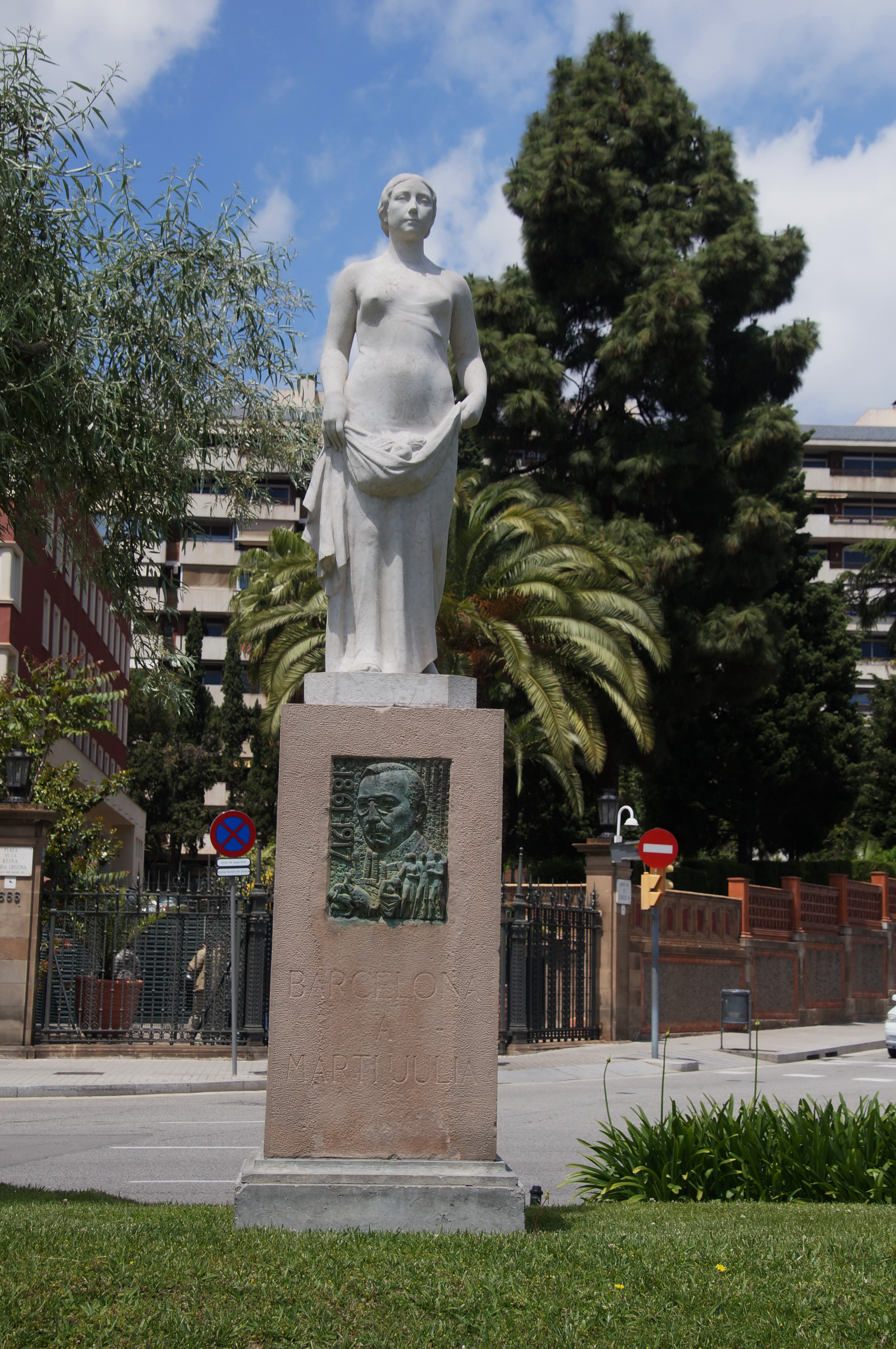 Al doctor Martí i Julià (Josep Dunyach). Pl. Reina Maria Cristina (Barcelona)